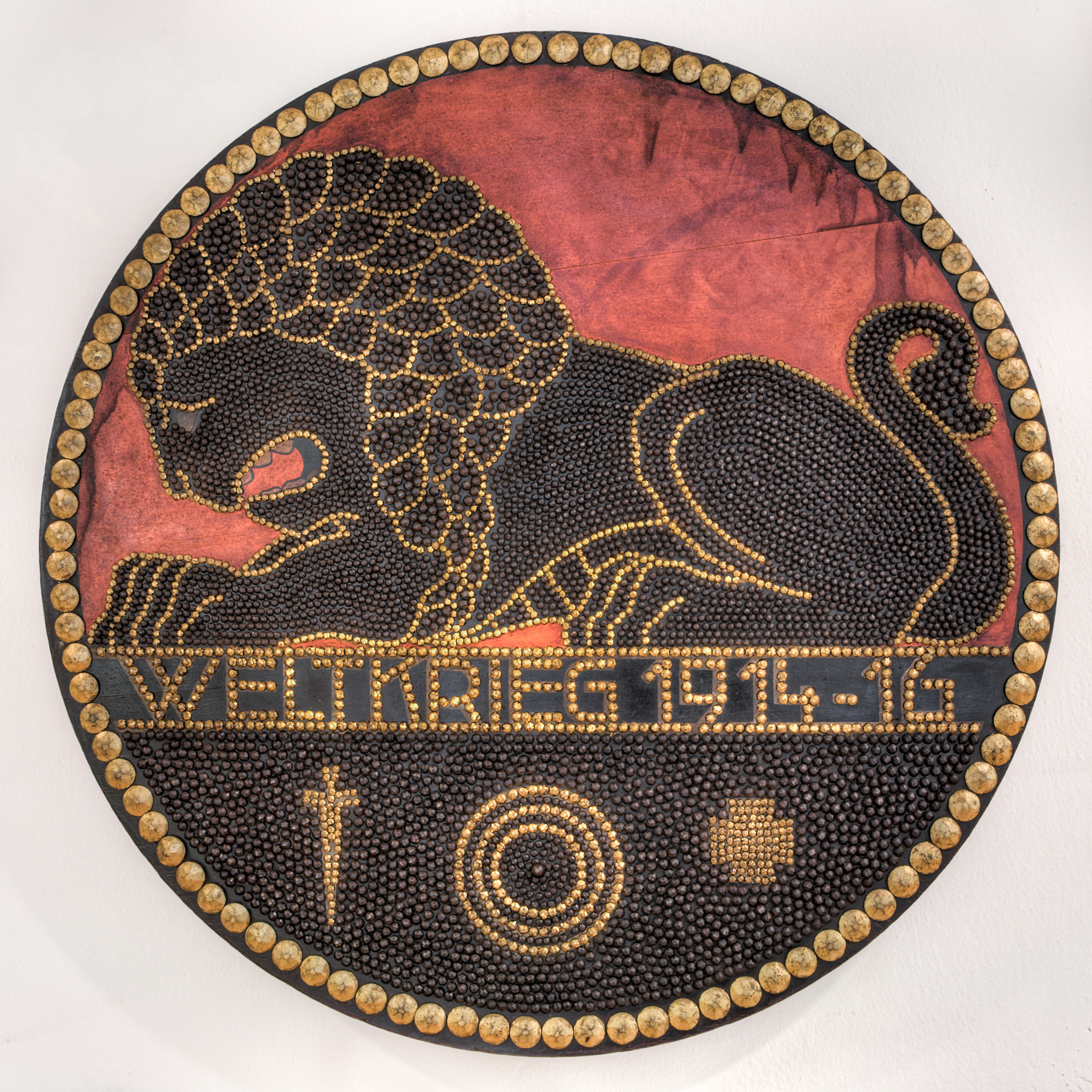 Das Oelper-Schild zeigt einen liegenden schwarzen Löwen aus Nagelköpfen. Es handelt sich um eine Kriegsnagelung von 1916 mit der zu Wohltätigkeitszwecken des ersten Weltkrieges Geld gesammelt wurde.